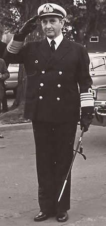 Almirante Rubén Oscar Franco en 1982.